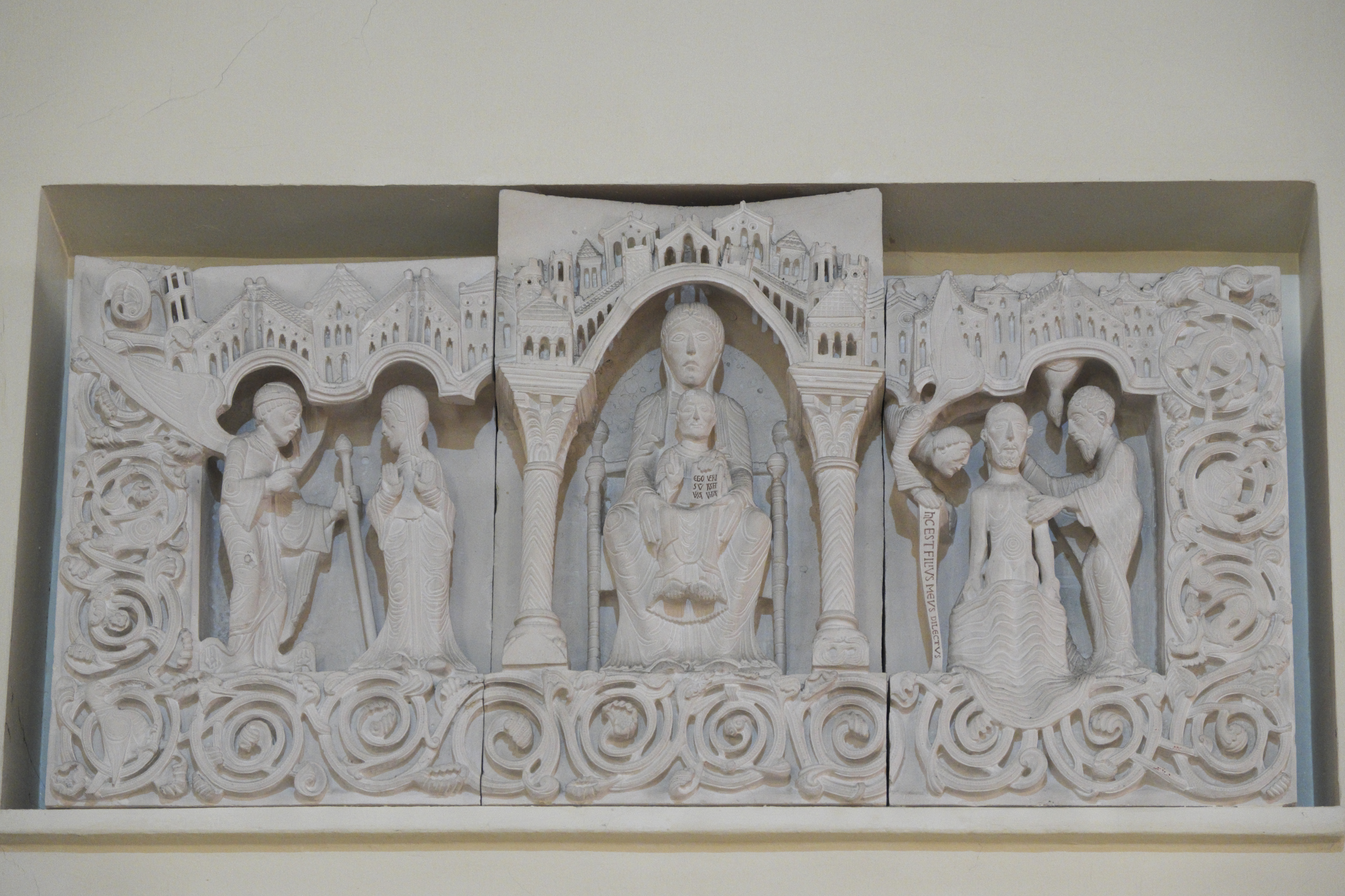 Katholische Pfarrkirche Saint-Jean-Baptiste in Carrières-sur-Seine im Département Yvelines (Île-de-France/Frankreich), Altarretabel aus dem 12. Jahrhundert (Kopie, Original im Louvre); Darstellung: Thronende Madonna (Mitte), Verkündigung (links), Taufe Jesu (rechts)